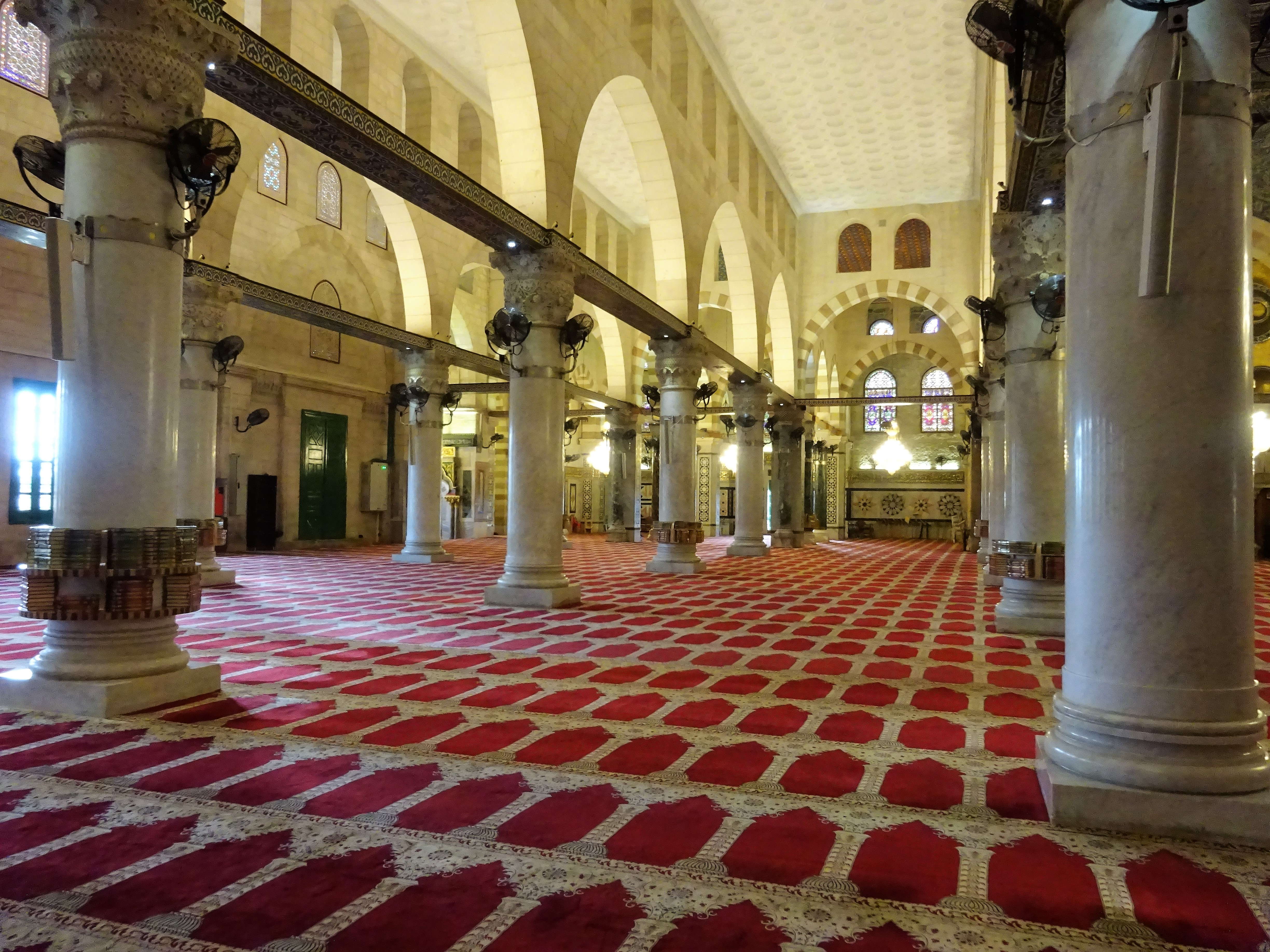 Al-Aqsa Mosque interior side, January 2018